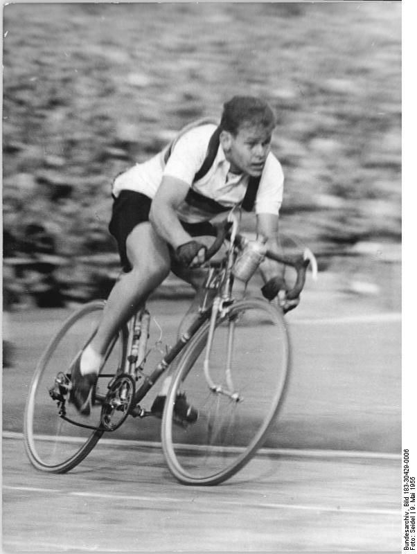 VIII. Friedensfahrt, Benno Funda Zentralbild Seidel 9.5.1955 - VIII. Internationale Friedensfahrt Prag-Berlin-Warschau 1955 (6. Etappe von Dresden nach Karl-Marx-Stadt über 103 km). UBz: Benno Funda (DDR) trifft ein.